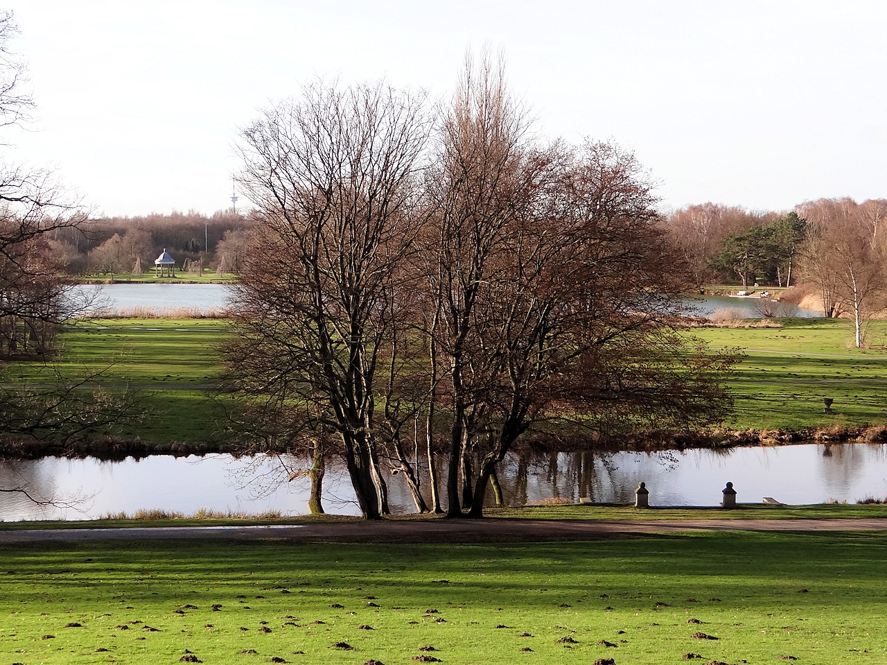 Blick vom Schloss Richmond zum Spielmannsteich, im Vordergrund der Kahnanleger mit Oker.